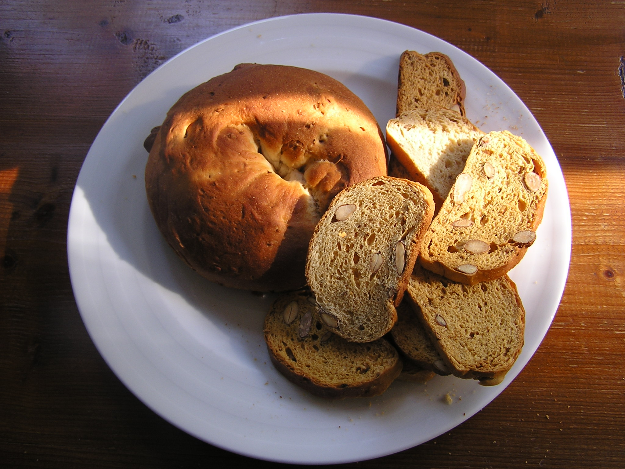 ciambella e fette, dolci tipici marchigiani impastati con mosto d'uva